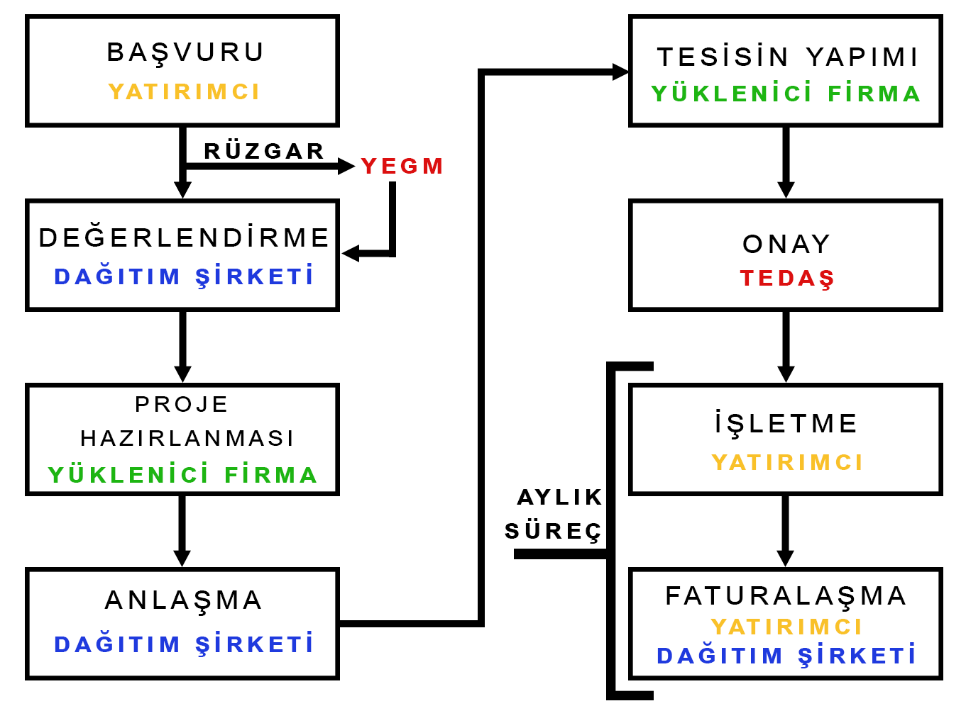 Tüketicilerin kendi elektriğini yenilenebilir enerji yoluyla üretmeleri için oluşturulmuş Lisanssız Elektrik Üretim sisteminin aşamaları.